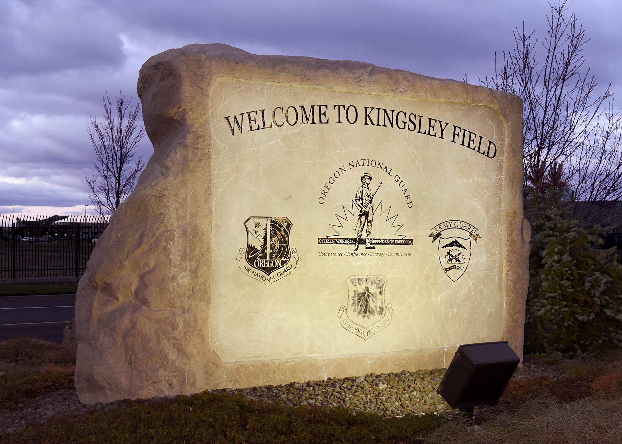 Kingsley Field